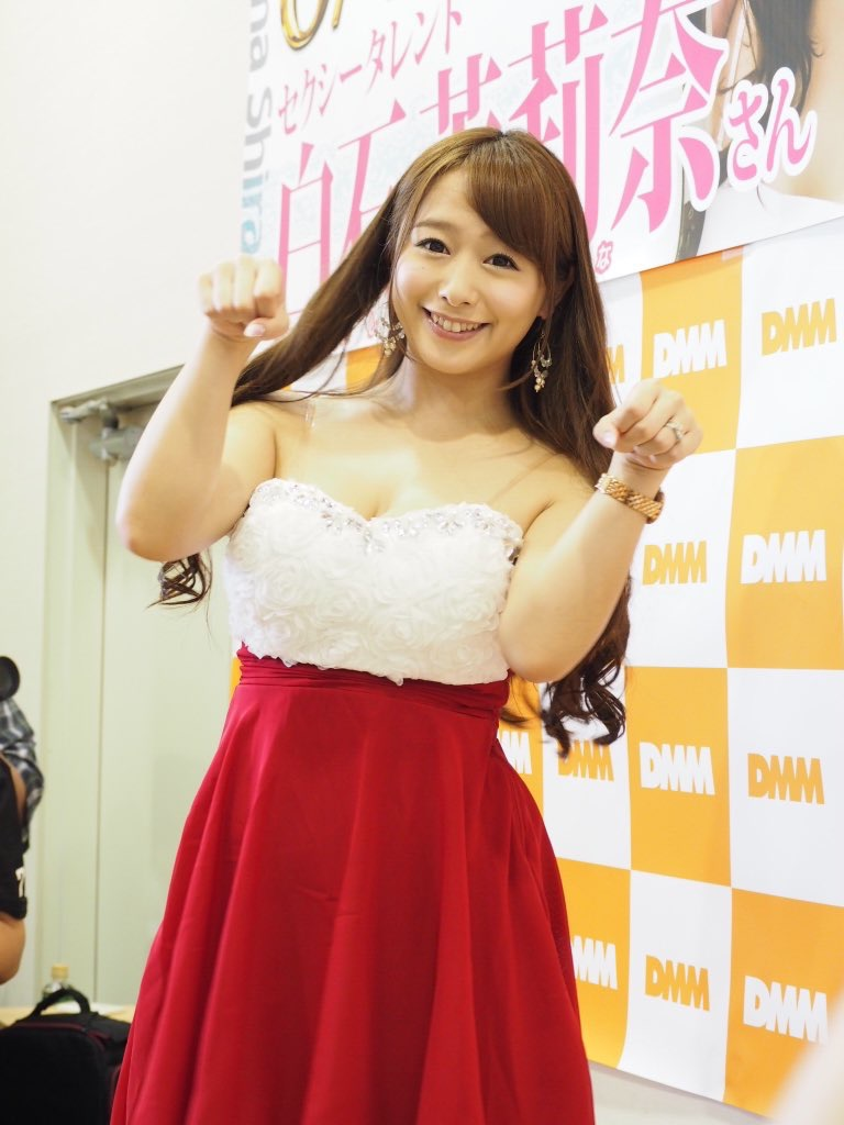 岐阜グリフィン穂積店様にて